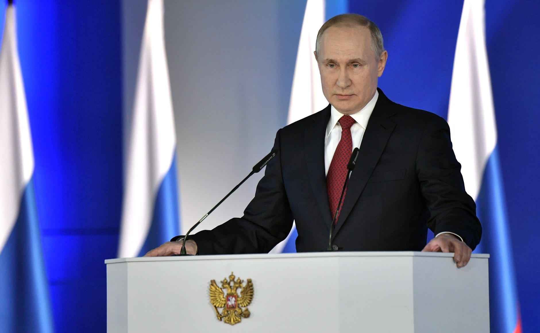 Послание Президента Федеральному Собранию